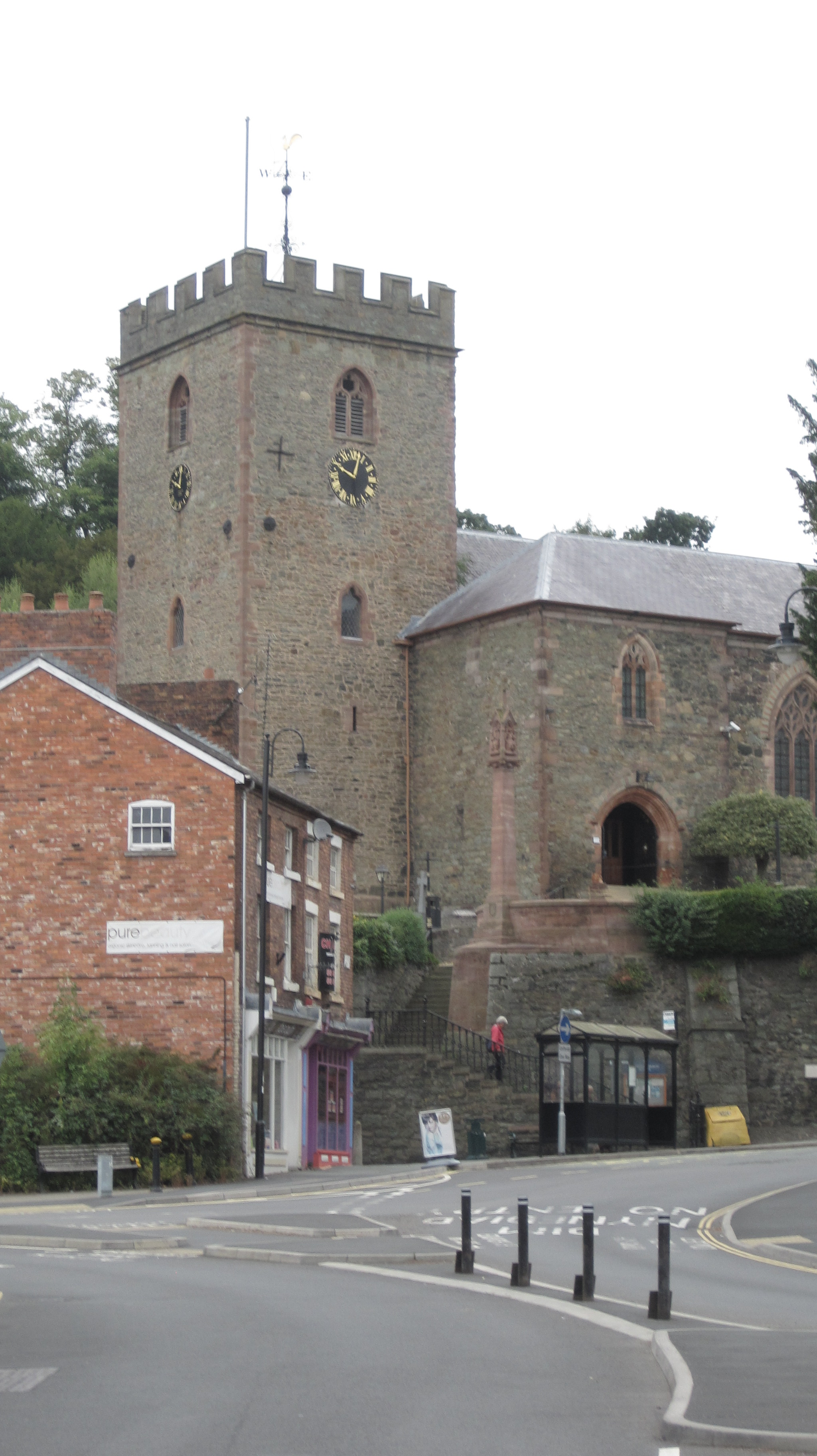 Eglwys y Santes Fair, Y Trallwng. Codwyd yr eglwys hon 750 o flynyddoedd yn ol.